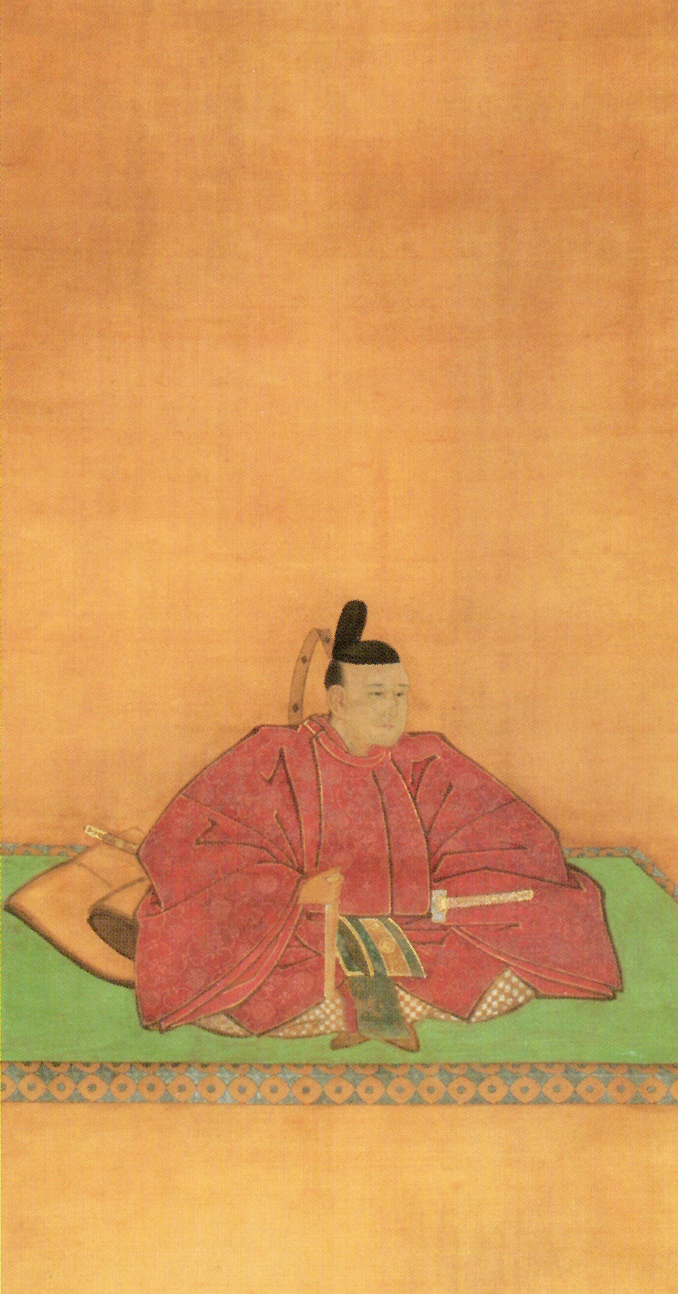 本多政礼の肖像。